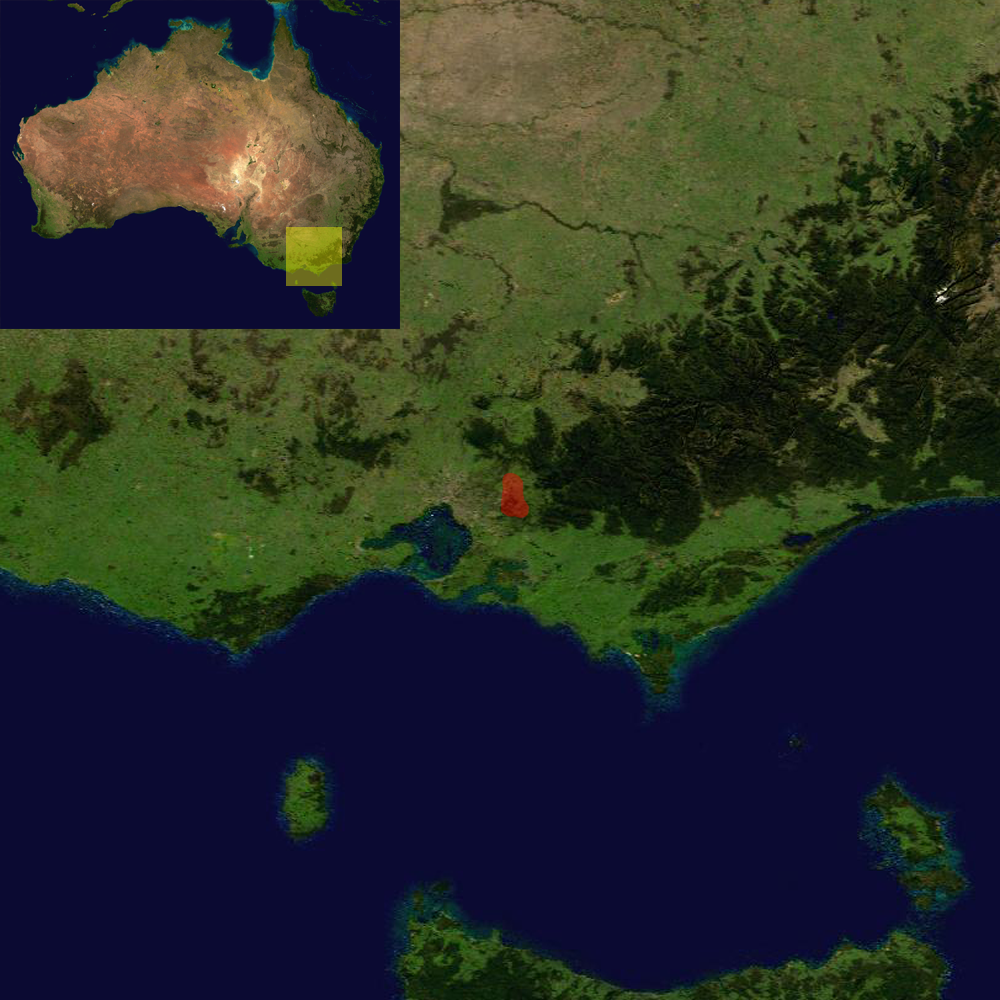 Distribution of Hadronyche modesta in Australia